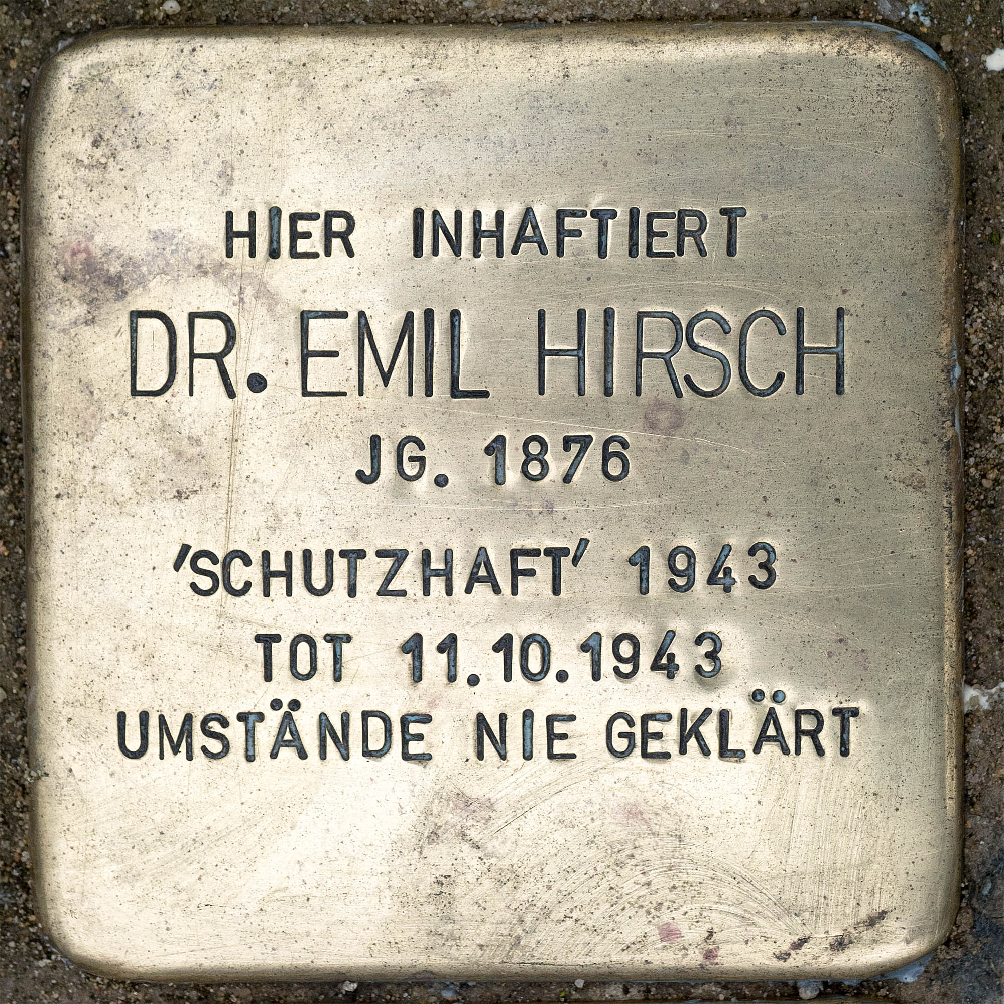 Stolperstein für Hirsch, Emil